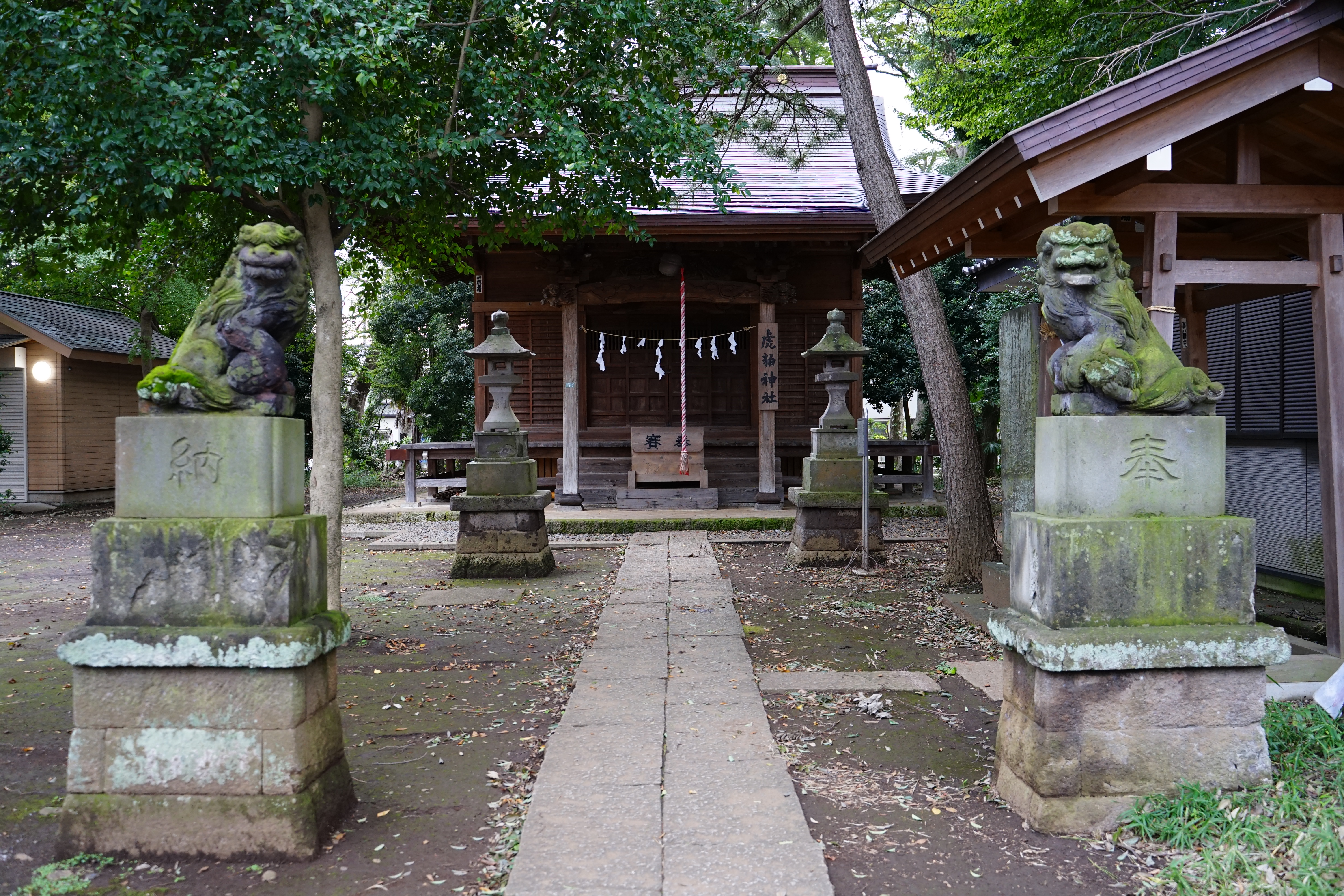 東京都調布市 虎狛神社